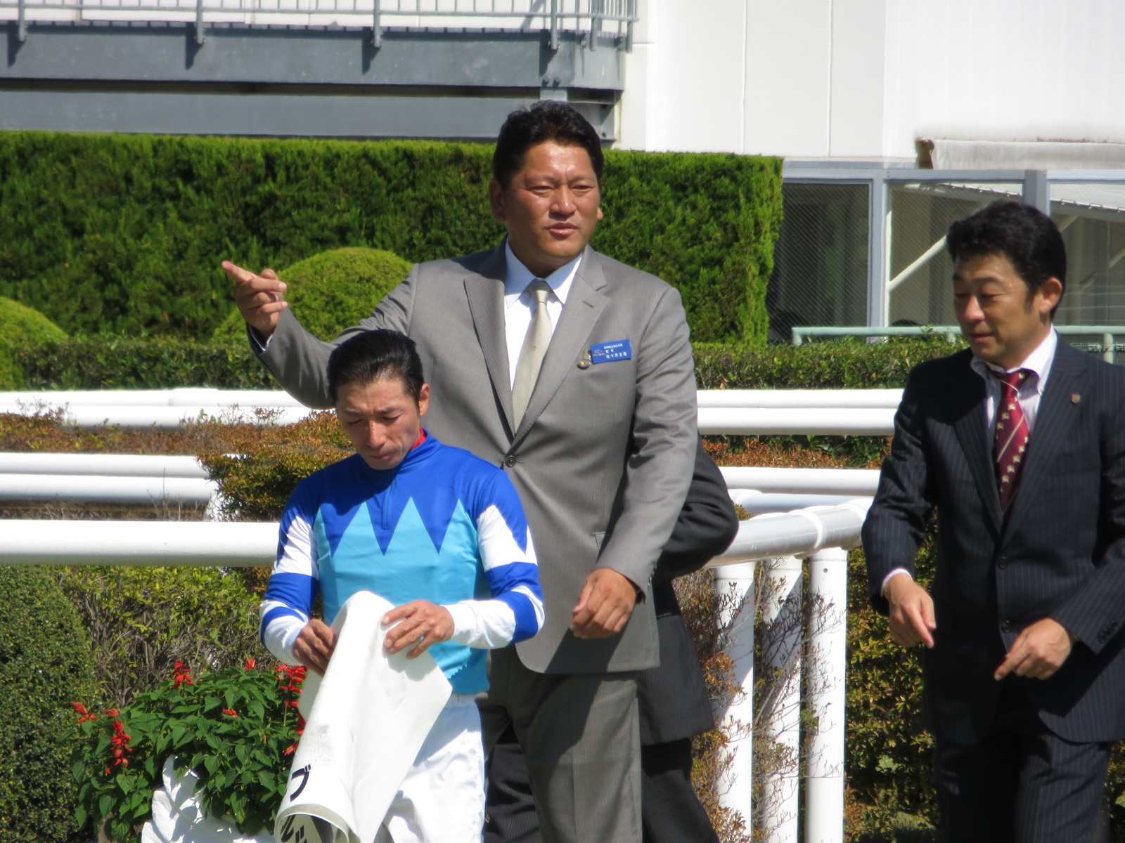 昨秋ものですが、野球殿堂入り記念で＾＾